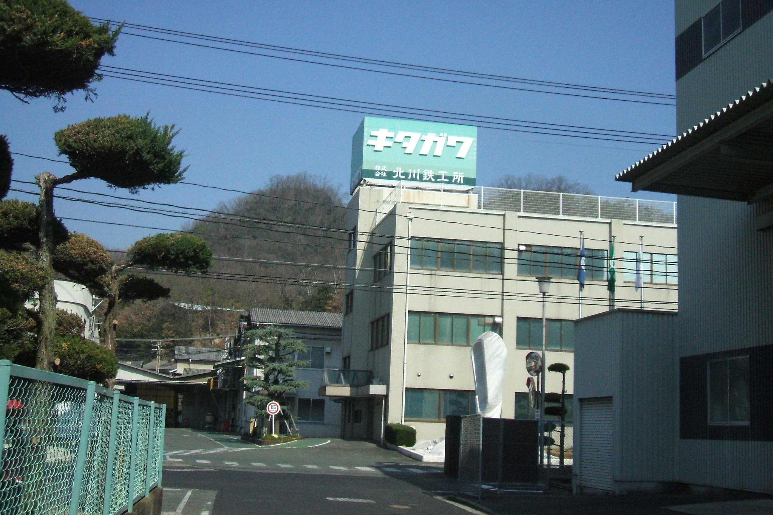 広島県府中市にある北川鉄工所の本社建物